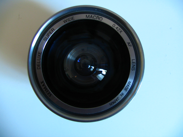 autore: mestesso